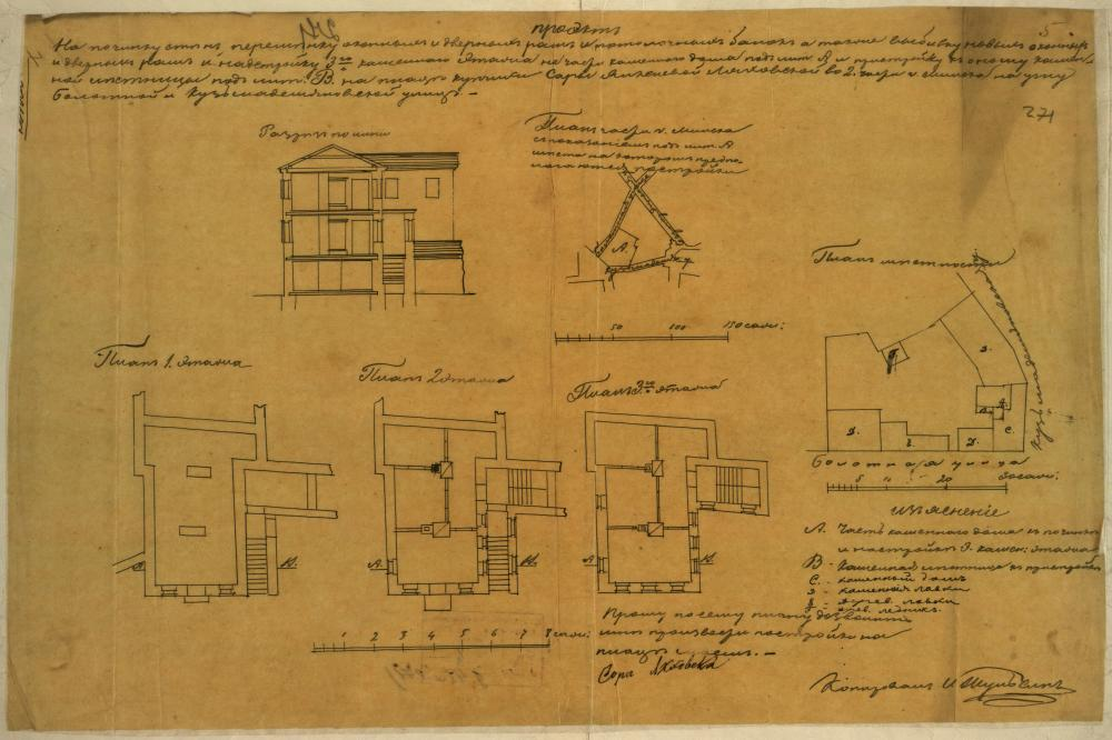 Беларуская (тарашкевіца): Менск (Miensk), Цёмныя Крамы (Ciomnyja Kramy): рог вуліцы Казьмадзям'янаўскай (vulica Kaźmadziamjanaŭskaja) і пляцу Нізкага Рынку (plac Nizki Rynak). Праект на рэканструкцыю мураванага трохпавярховага дома мяшчанкі С. Ляхоўскай на месцы зруйнаванага расейскімі ўладамі касьцёла Сьвятога Яна і кляштару баніфратаў